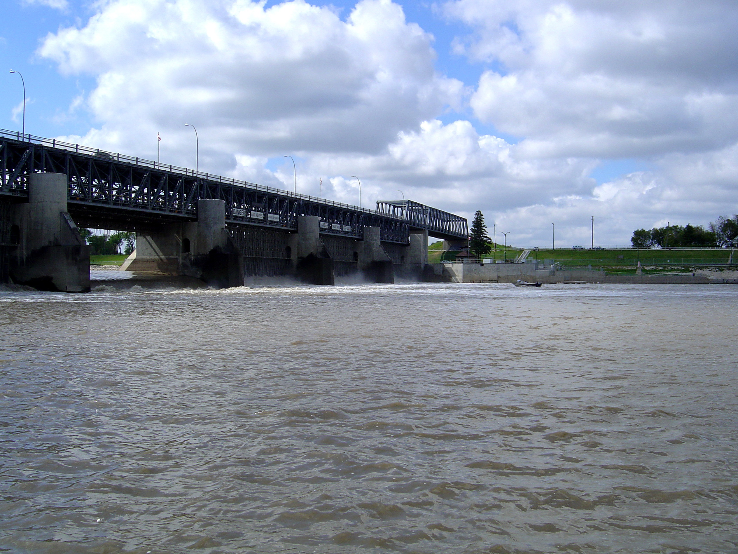 Lockport Locks, Manitoba, Canada